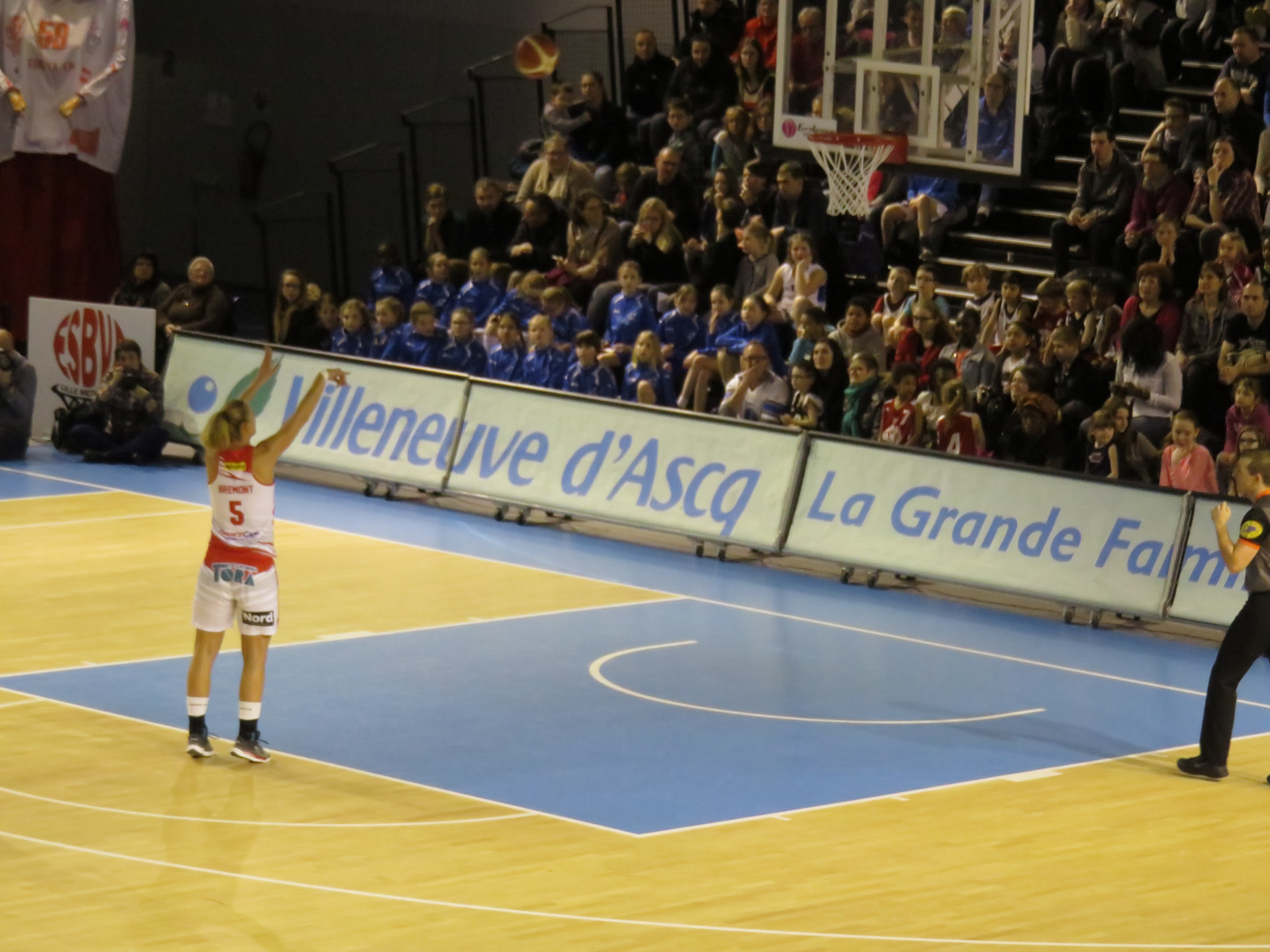 Premier quart-temps